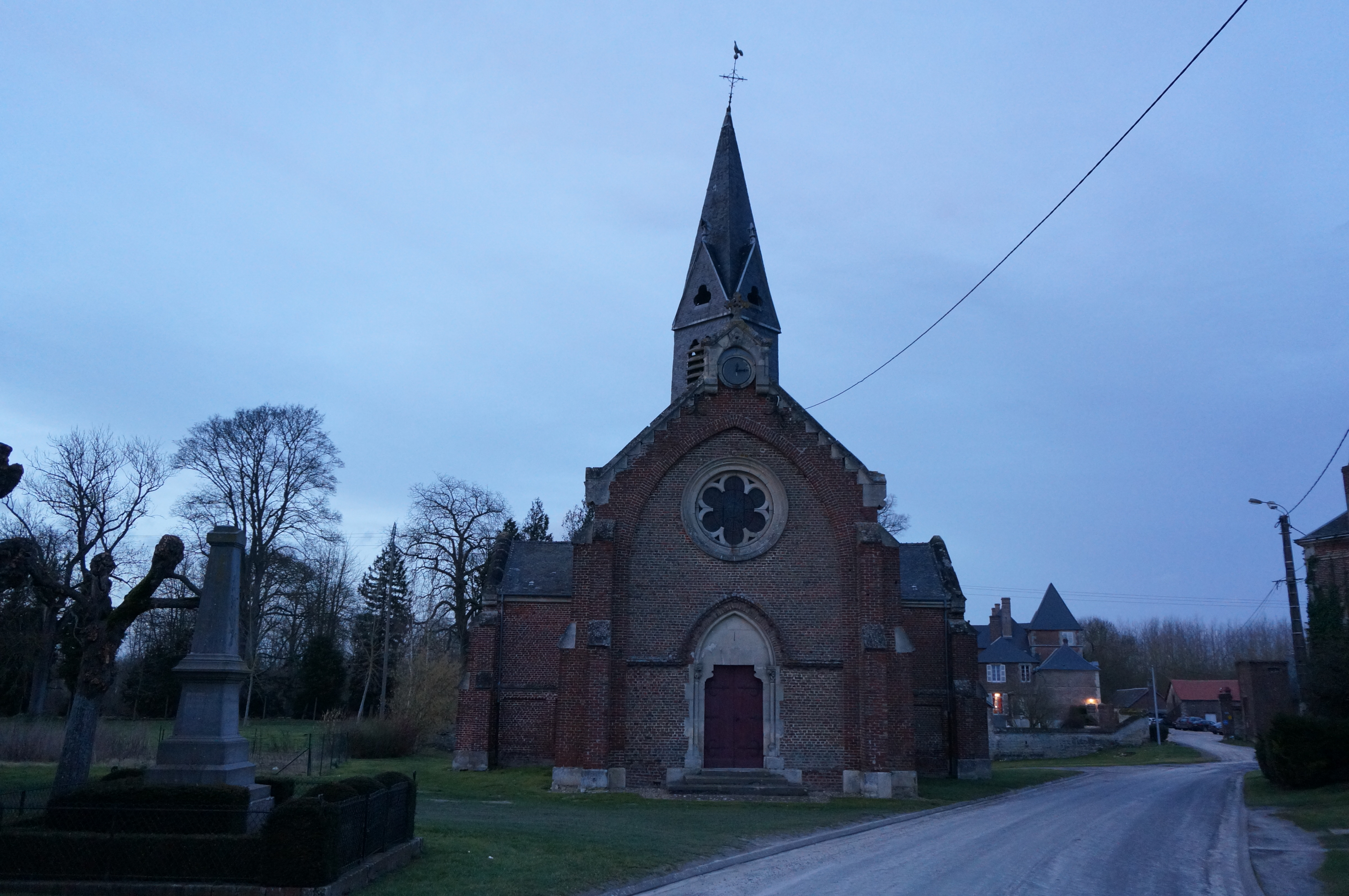 Vue du village.